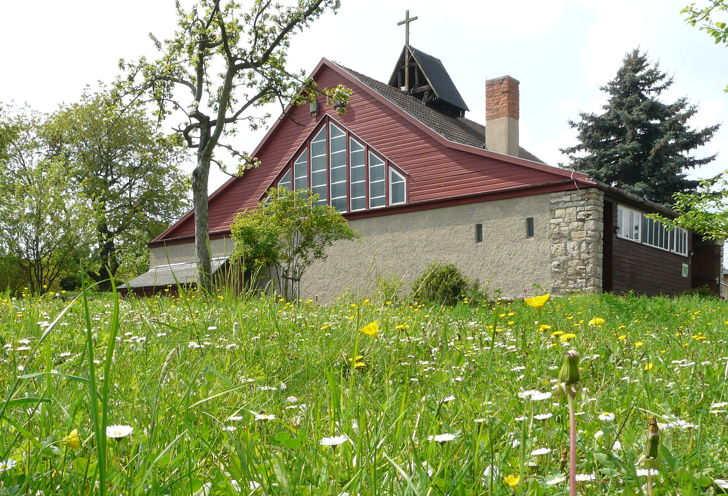 Die Cyriakkapelle im Erfurter Stadtteil Brühlervorstadt, eine sog. Diasporakapelle aus dem Notkirchenprogramm des Architekten Otto Bartning. Sicht von Nordosten, Frühjahr 2009. Erbaut 1950, Denkmalschutz seit 8.3.2001. Adresse: D-99094 Erfurt, Im Gebreite 75.